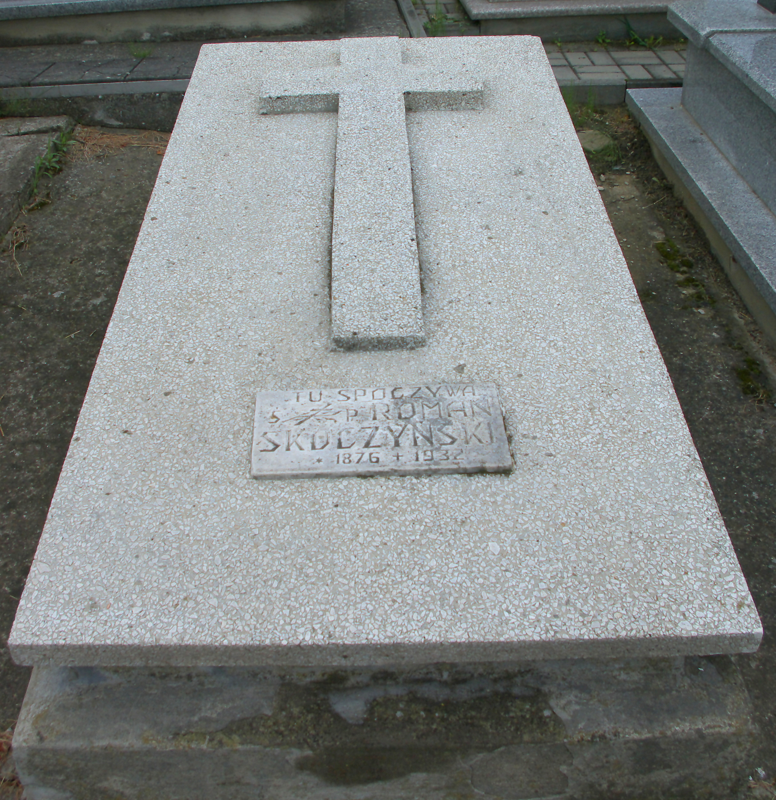 Grób Romana Skoczyńskiego na Cmentarzu Centralnym w Sanoku.